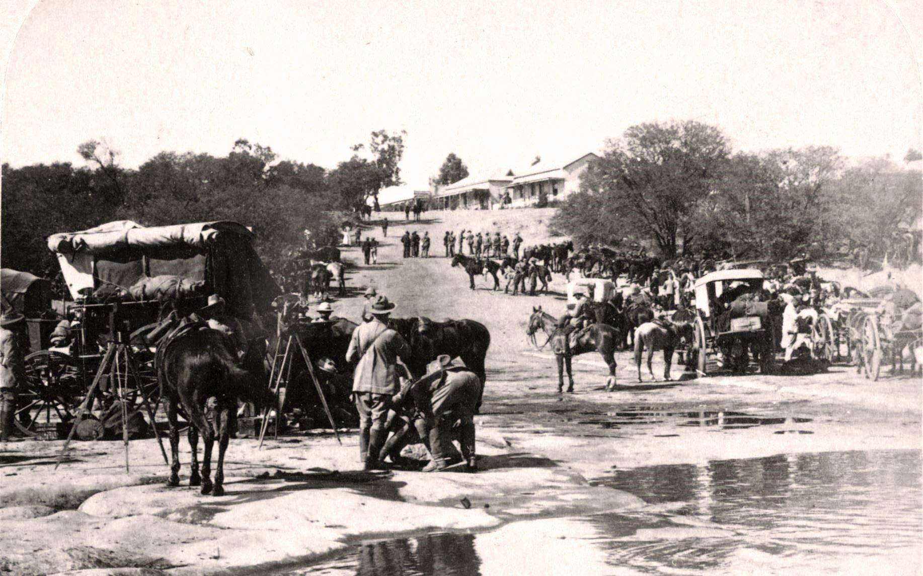 IdentificatieTitel(s): Gezicht op een rivieroever met paardenkarren bij Kroonstad, Zuid-AfrikaHistory Recorders and History Makers, Correspondents' Carts waiting Lord Roberts' entry to Kroonstadt, S.A. (titel op object)Objecttype: stereofoto Objectnummer: RP-F-F08998Opschriften / Merken: opschrift, recto, gedrukt: ‘Works and Studios ~/ Arlington, N.J. Littleton, N.H. Washington, D.C.’nummer, recto, gedrukt: ‘104’Copyright: Publiek domein